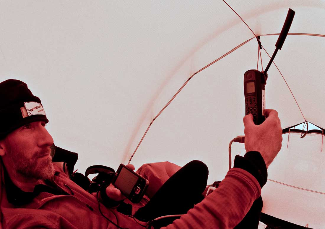 Michele Pontrandolfo usa un telefono Iridium durante la traversata Sud - Nord della Groenlandia.